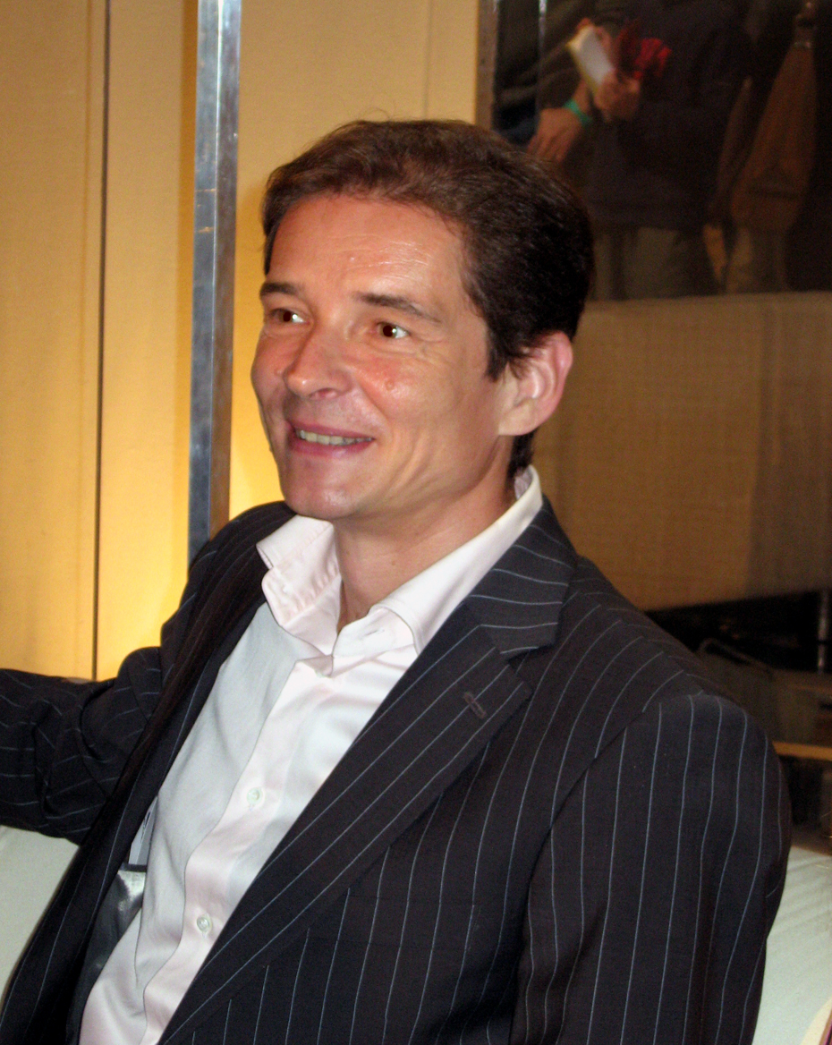 Przemysław Babiarz na dniu Otwartym TVP (9 września 2007)